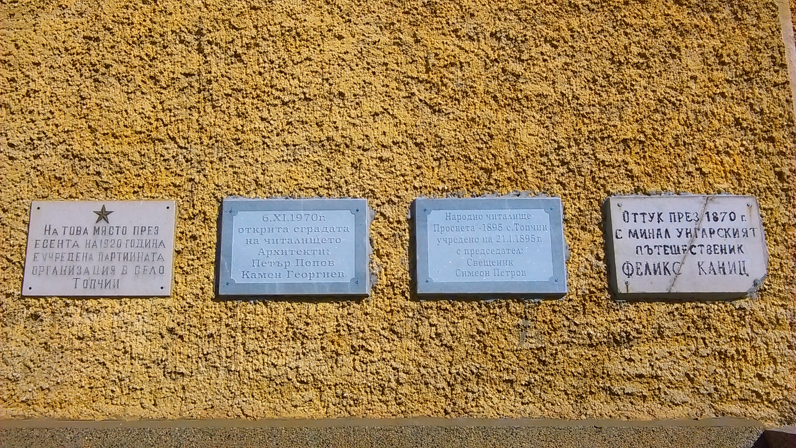 Мемориални плочи в село Топчии